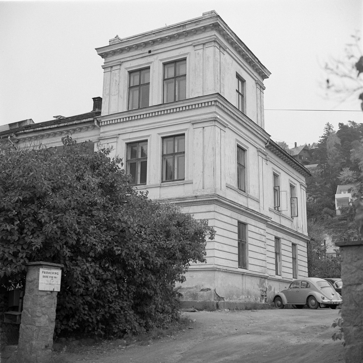 Bolighus Løvliveien Bekkelaget